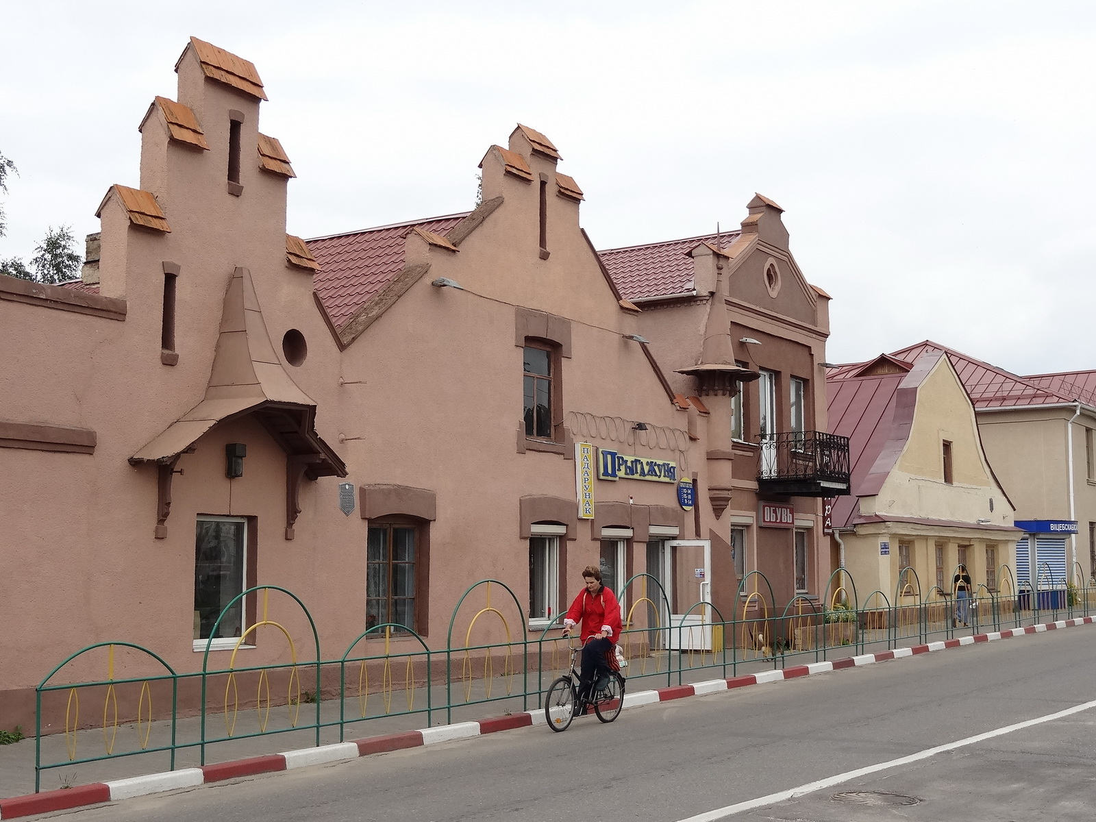 застройка площади Рынок, дома ремесленников (XVIII век)